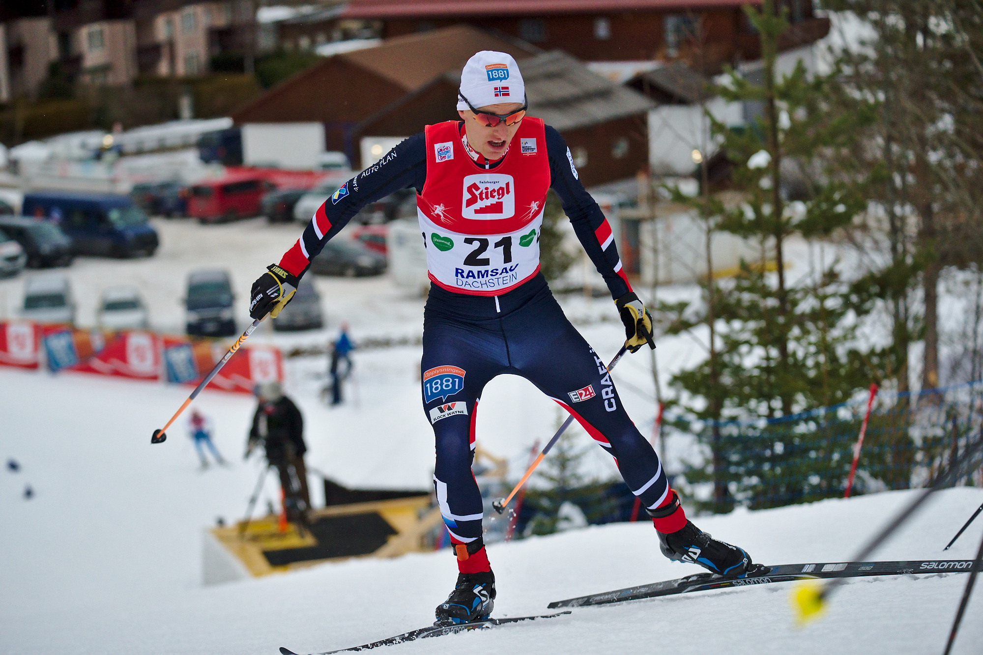 FIS Worldcup Nordic Combined Ramsau 2016. Bild zeigt Håvard Klemetsen (NOR)